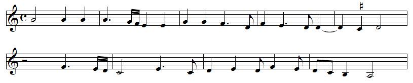 Мелодия 'Fors seulement' (автор неизвестен), использованная в шансон Иоанна Окегема (фрагмент тенора)